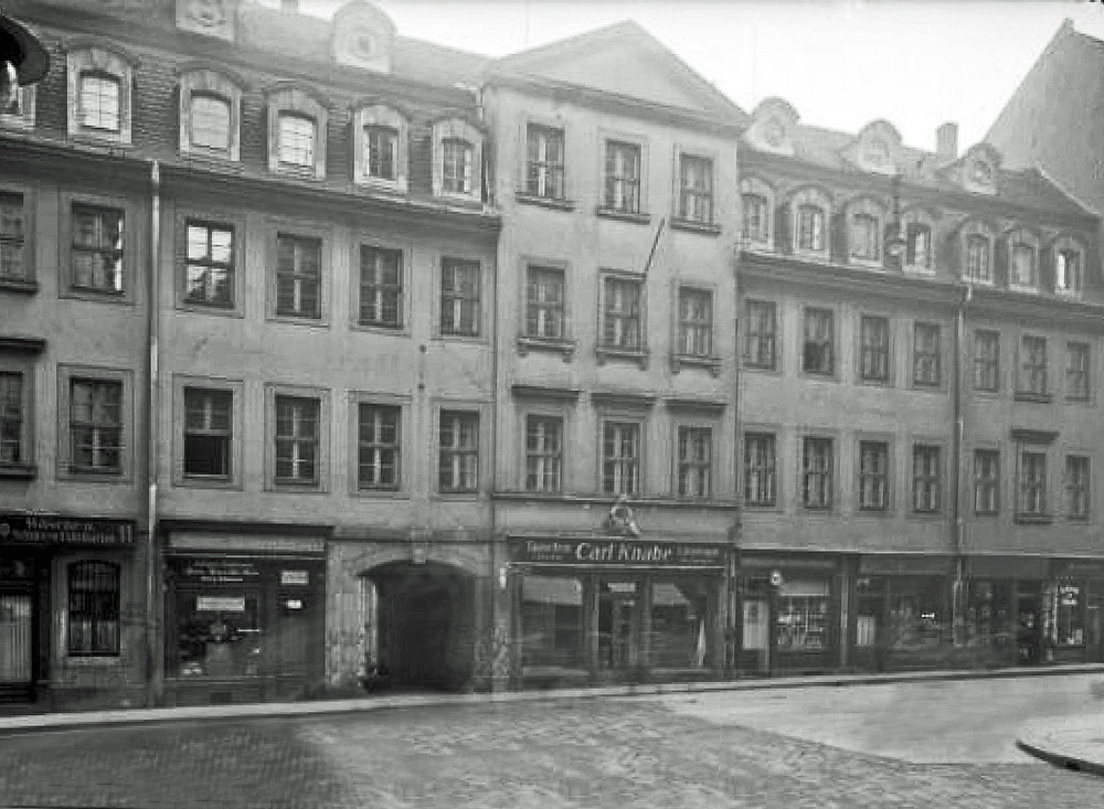 Das Haus "Goldener Bär" in Leipzig um 1925